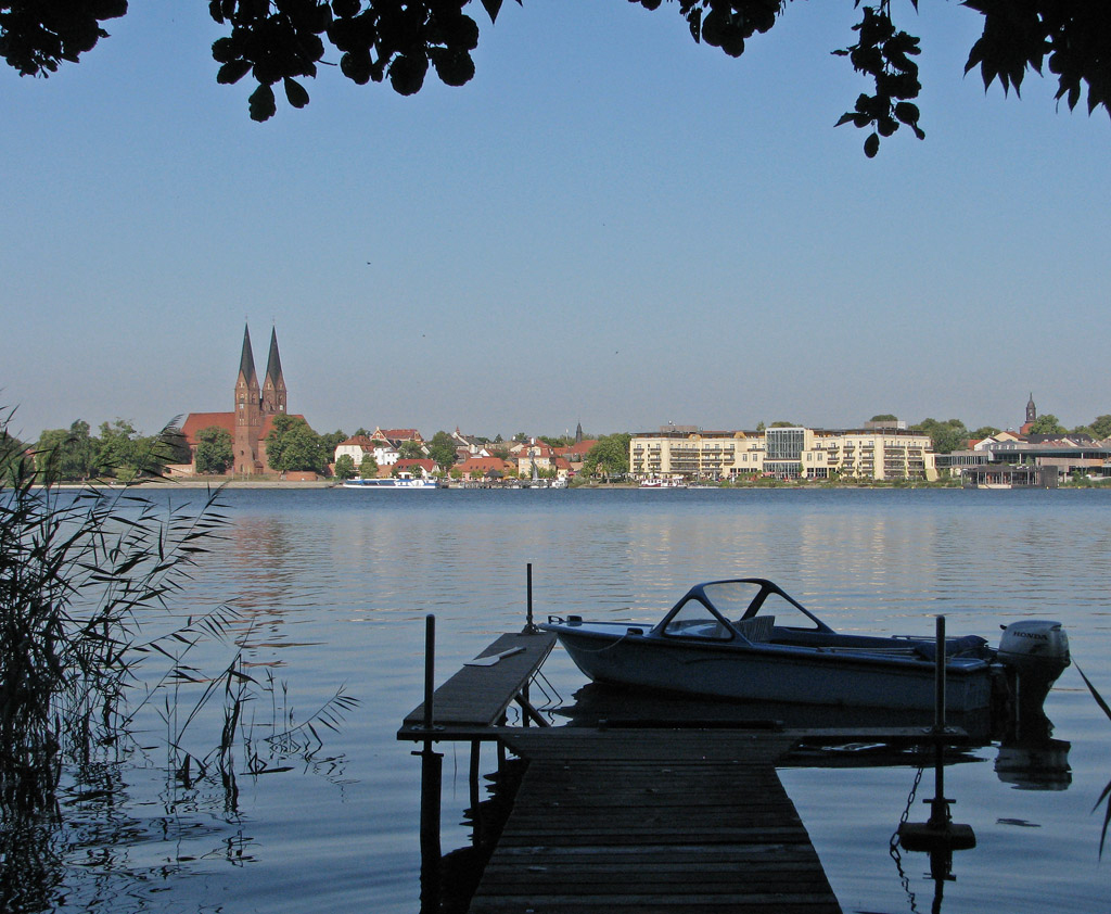 Ruppiner See, von der Lindenallee